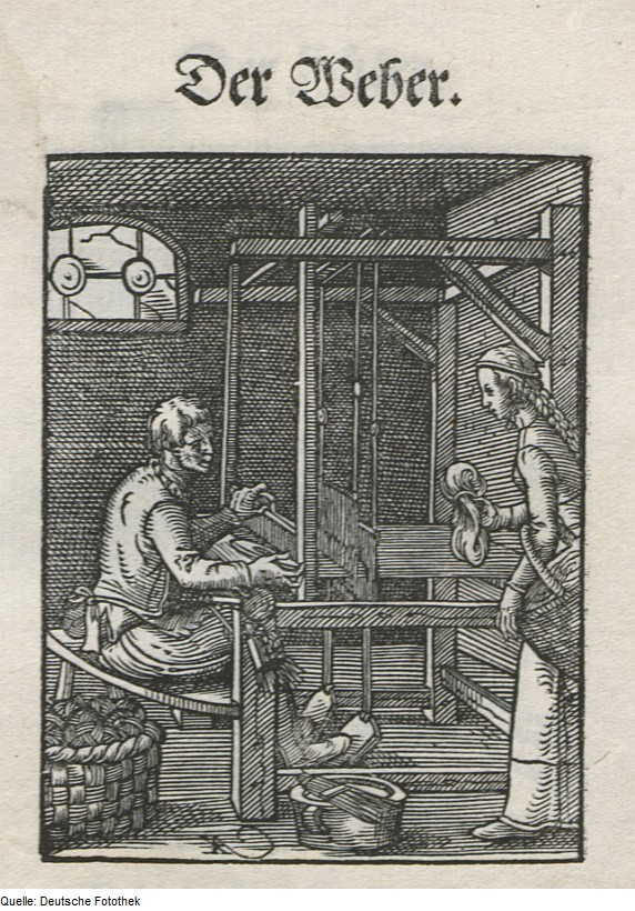 Original image description from the Deutsche FotothekStändebuch & Handwerk & Weber & Webstuhl